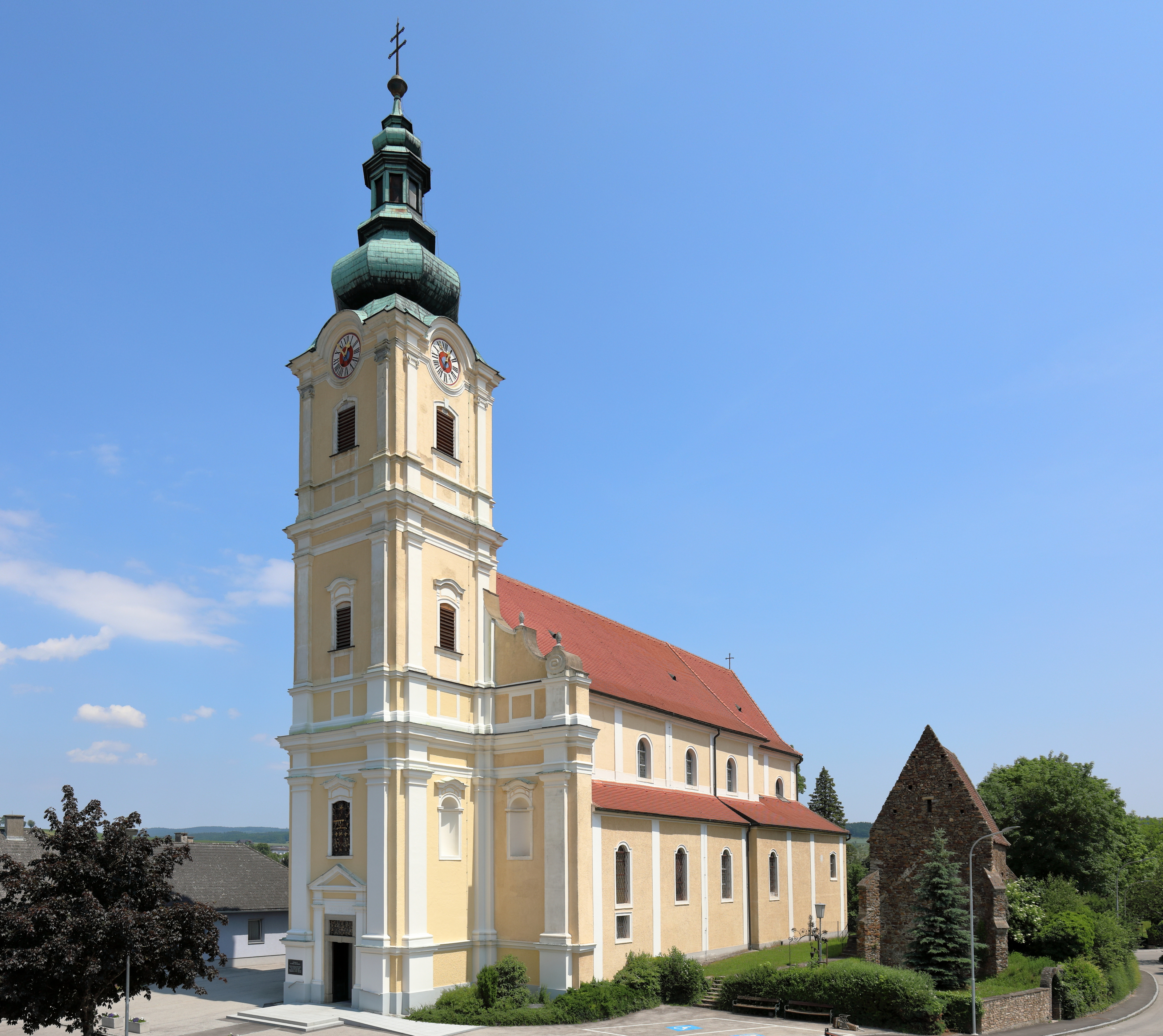 Die röm.-kath. Pfarrkirche hl. Lorenz in der niederösterreichischen Marktgemeinde Loosdorf und rechts der Karner.Die Kirche mit einem 4-jochigen Langhaus und einem eingezogenen 2-jochigen Chor wurde in den 1570er/1580er Jahren errichtet. Die Turm und die Westfassade stammen aus den 1730er Jahren. Südöstlich der Kirche befindet sich der Karner, der im 14. Jahrhundert errichtet wurde.